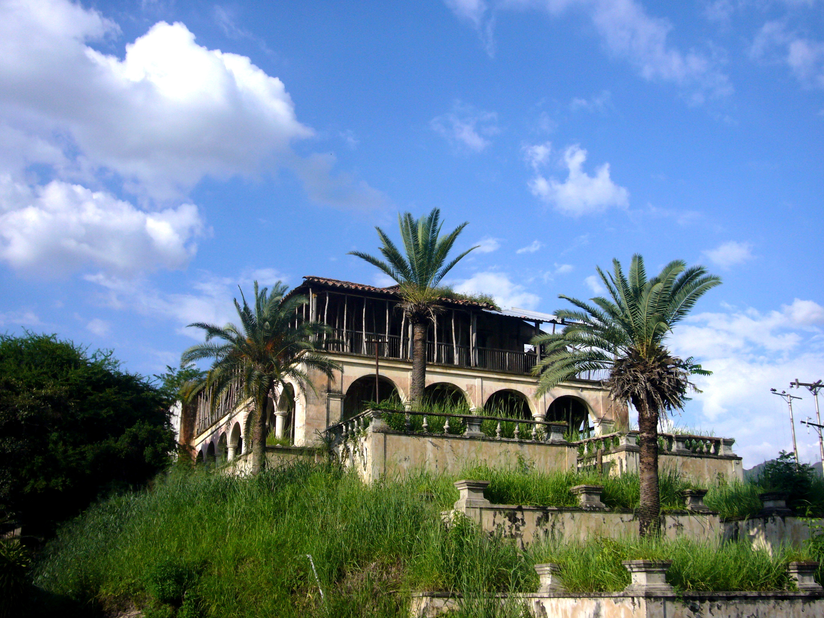 Vista actual de la Casona de la Hacienda La Trinidad